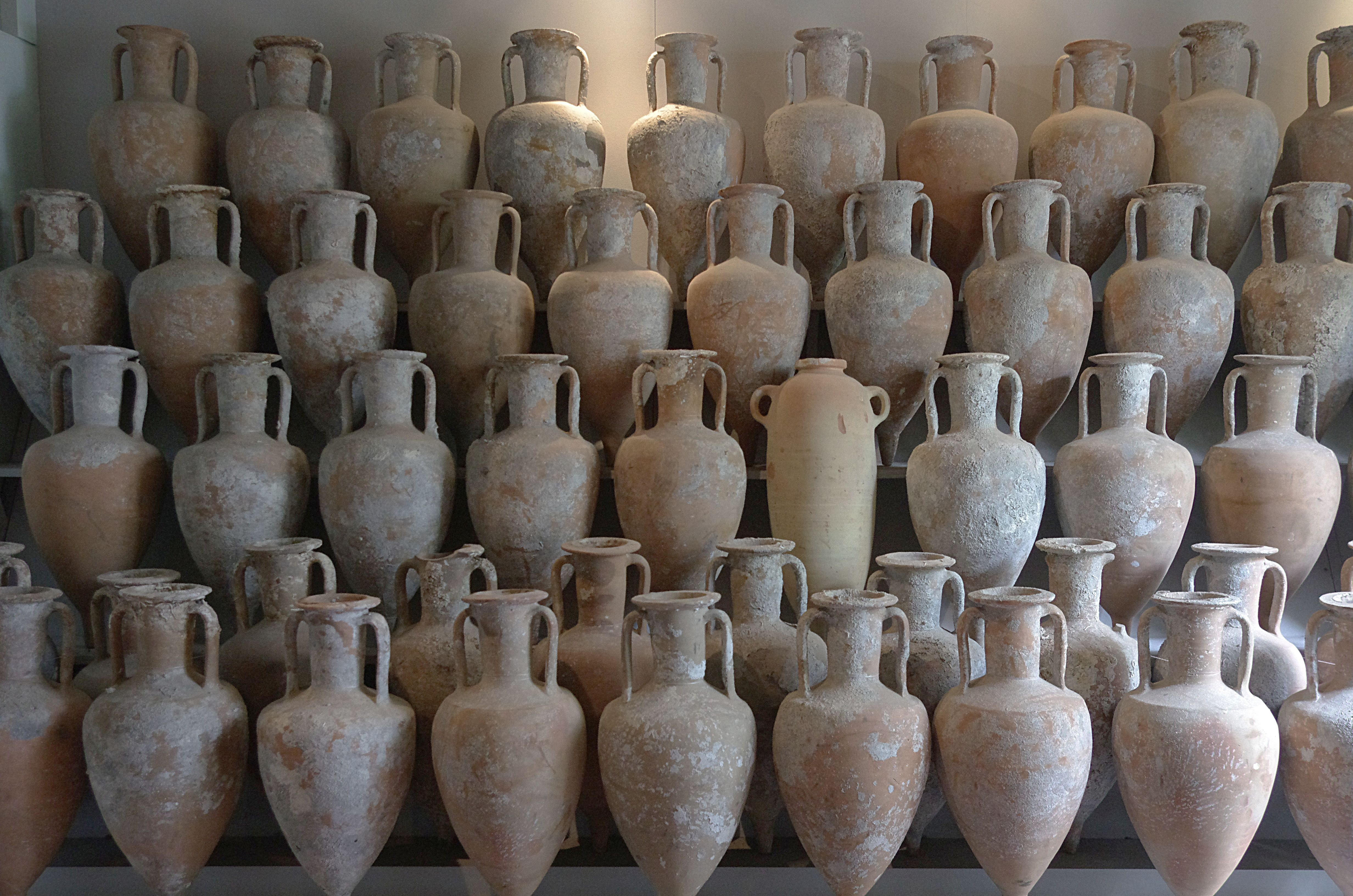 Lipari in Sizilien in Italien. Im Archologsichen Museum sind die Amphoren aufgereiht.